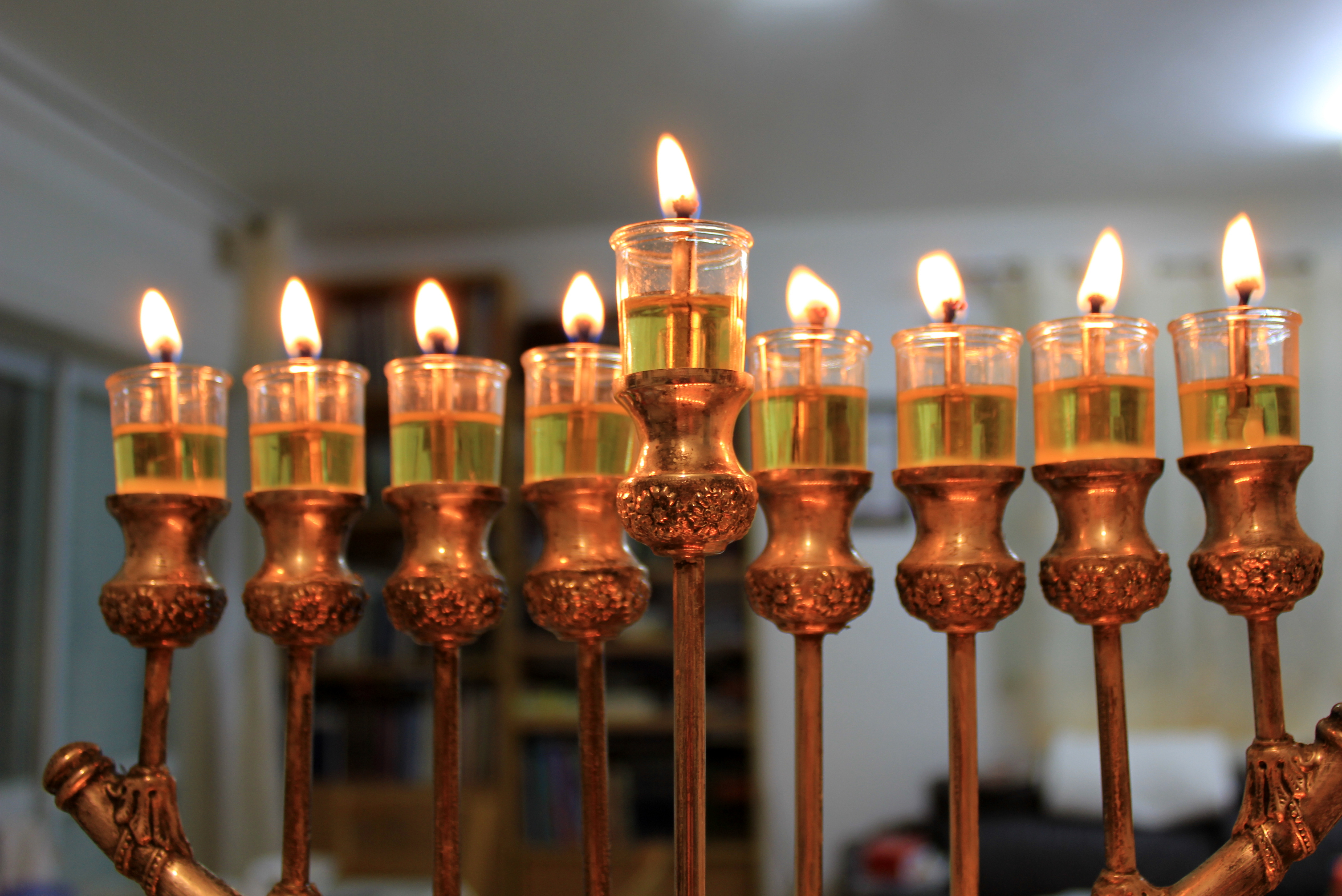 Hanukkah Hanukkah